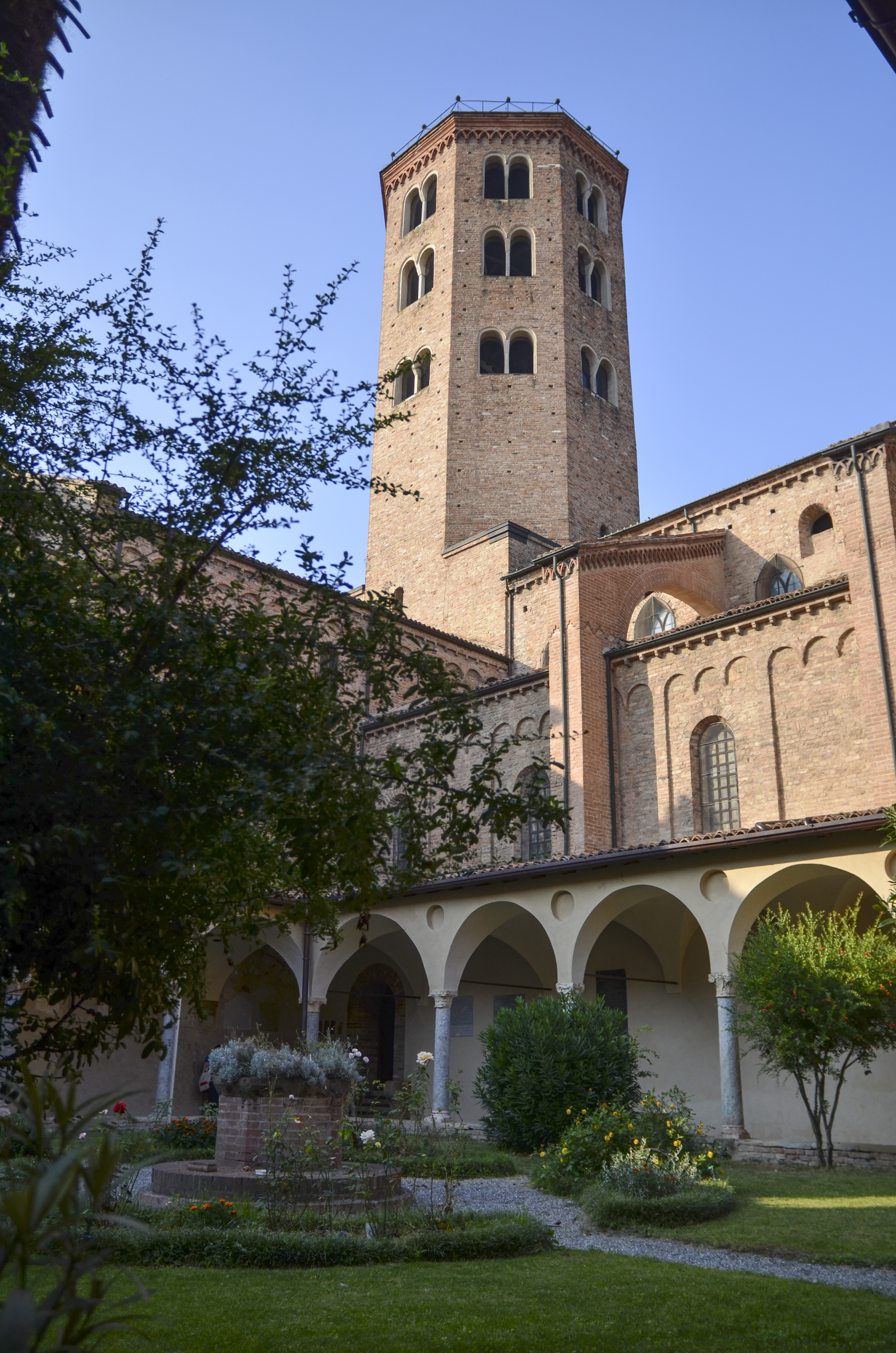 Basilica di Sant'Antonino This is a photo of a monument which is part of cultural heritage of Italy.